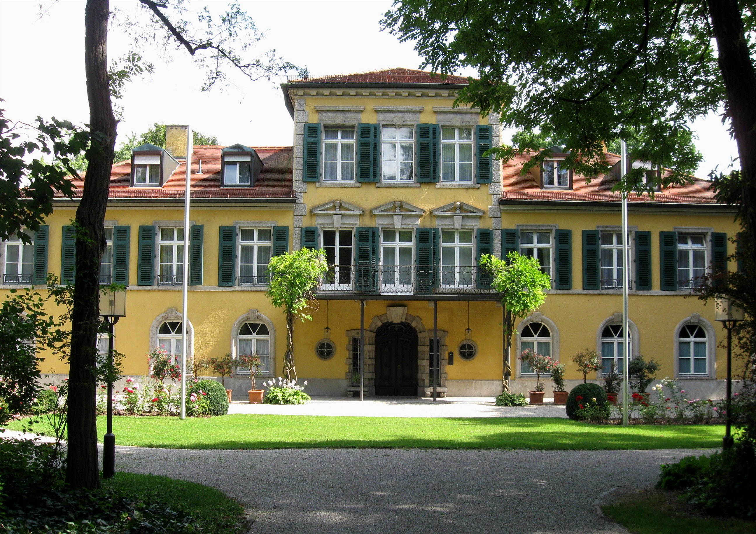 Werneckstraße 24; Schloss Suresnes, jetzt Teil der Katholischen Akademie, um 1715-18 vielleicht von Johann Baptist Gunezrainer, 1925 von Karl Bücklers umgebaut. Garten mit zahlreichen barocken und neubarocken Figuren. In der Westmauer Halbrondell mit Torpfeilern des späten 18. Jh. und Gitter. Im Norden Nebengebäude von 1925.